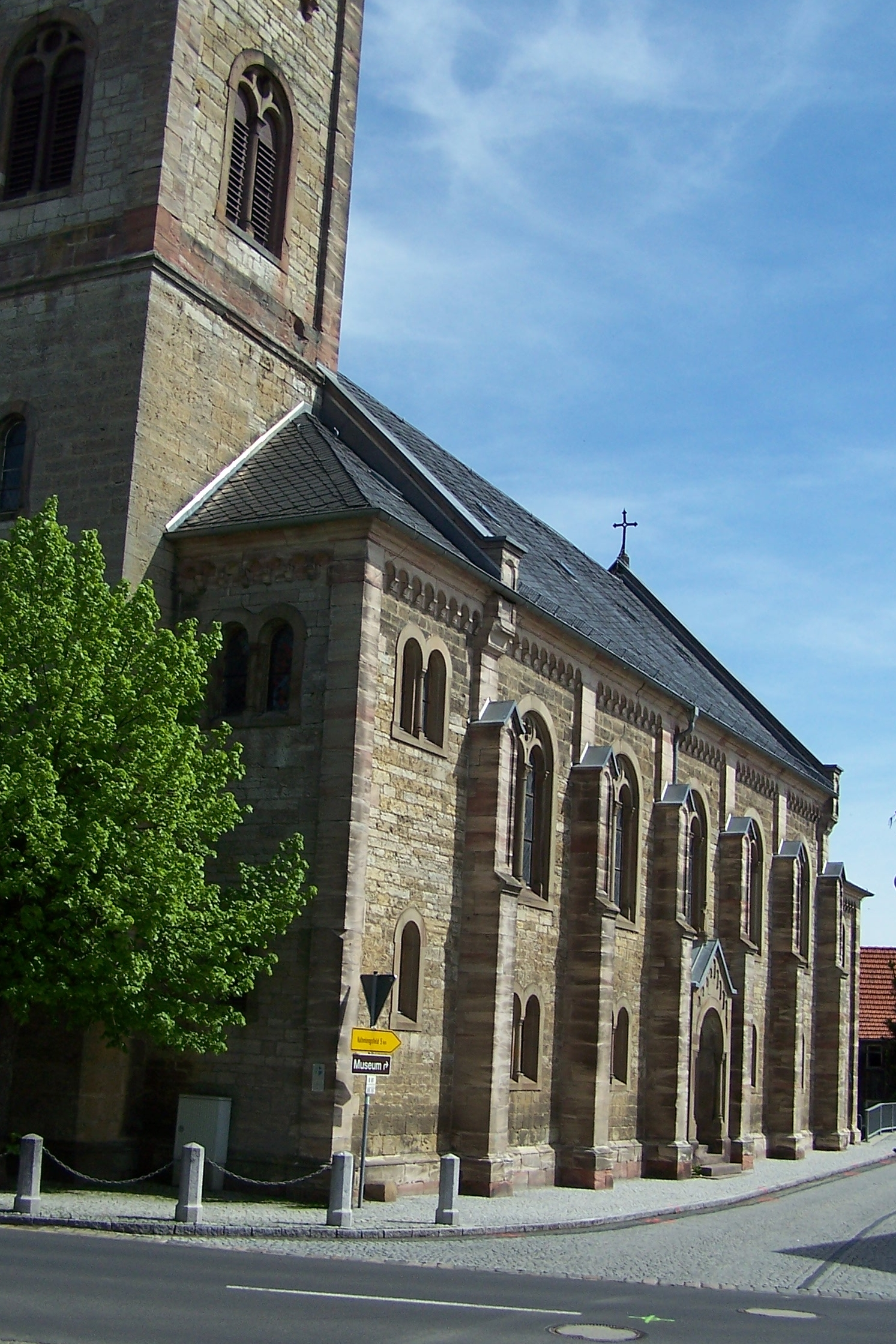 Die Südfassade der Stadtkirche in Kaltennordheim.